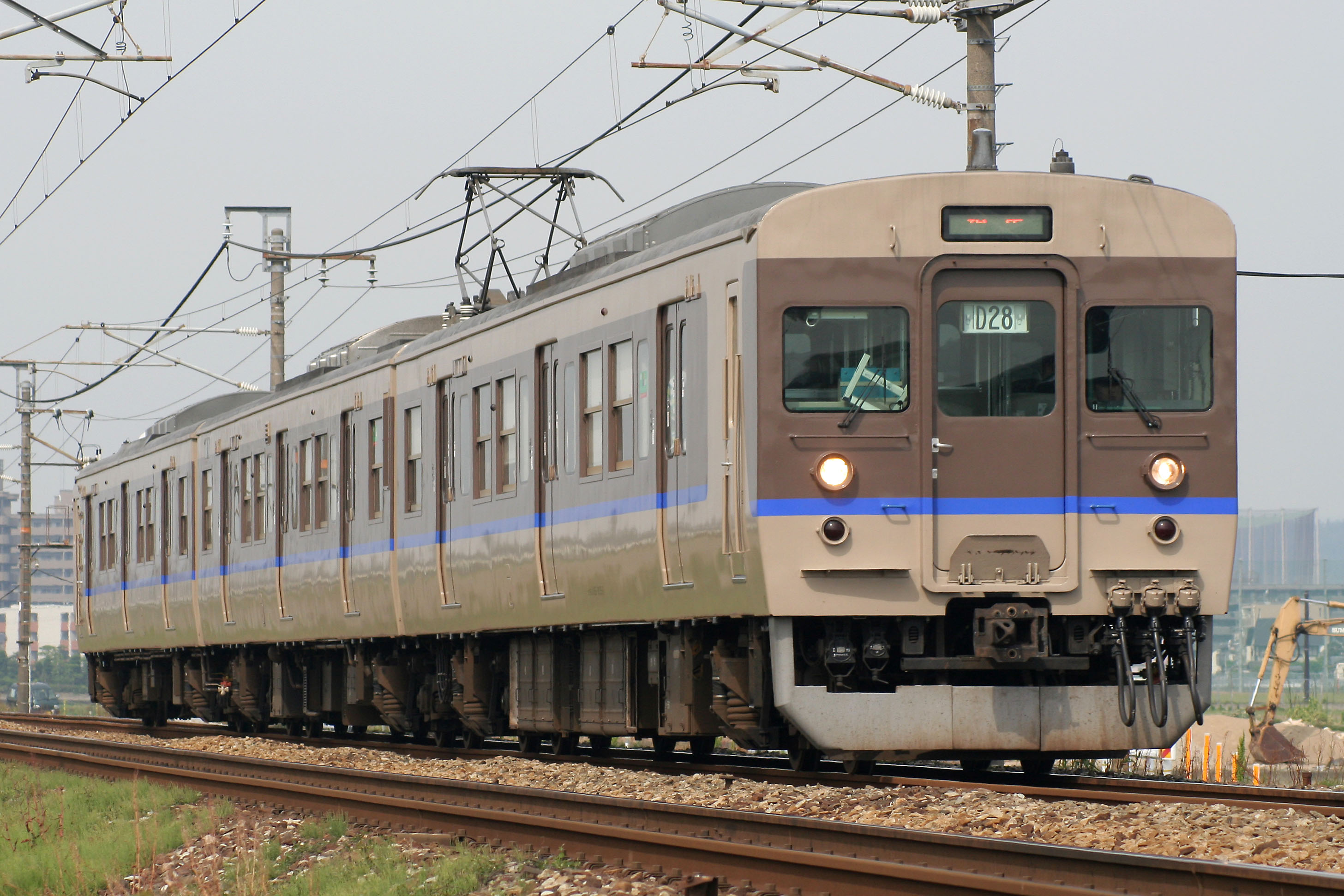 JR西日本115系電車D27編成とA03編成（？）山陽本線、中庄 - 庭瀬